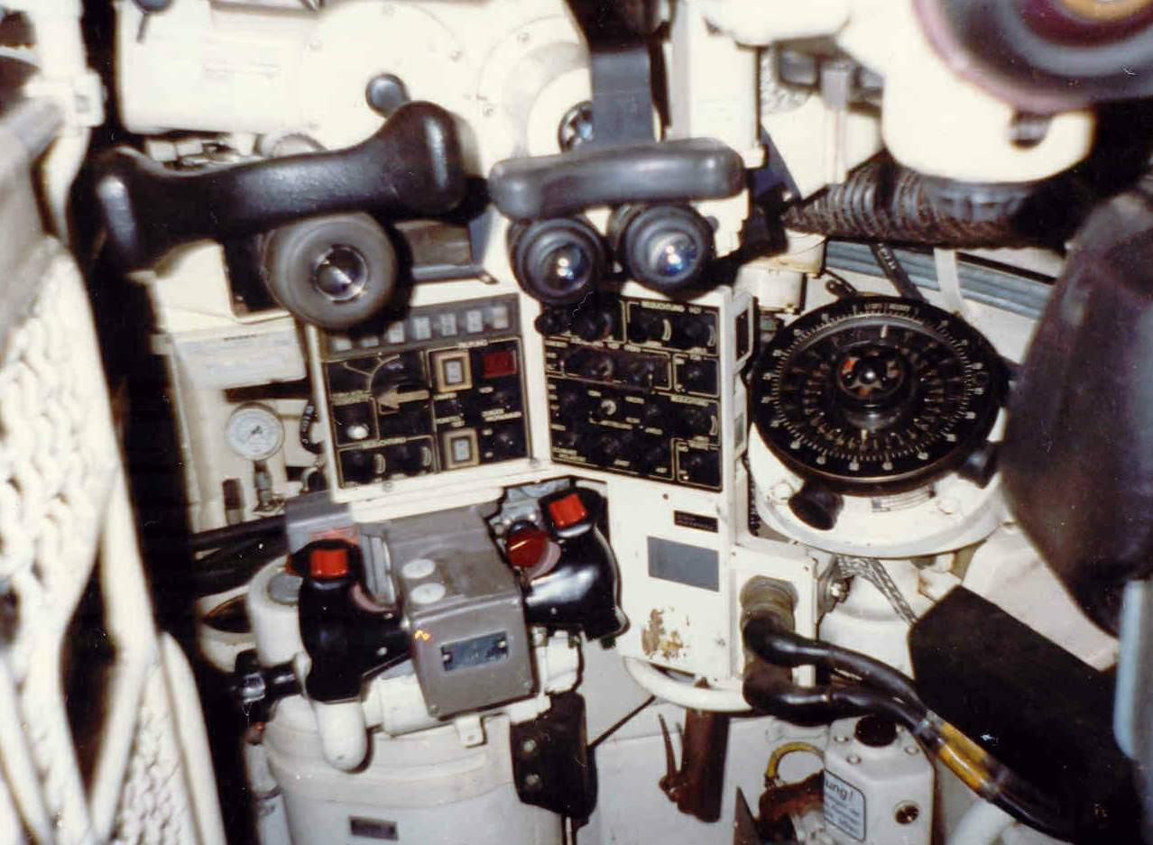 Kampfpanzer Leopard 1A5 Richtschützenplatz